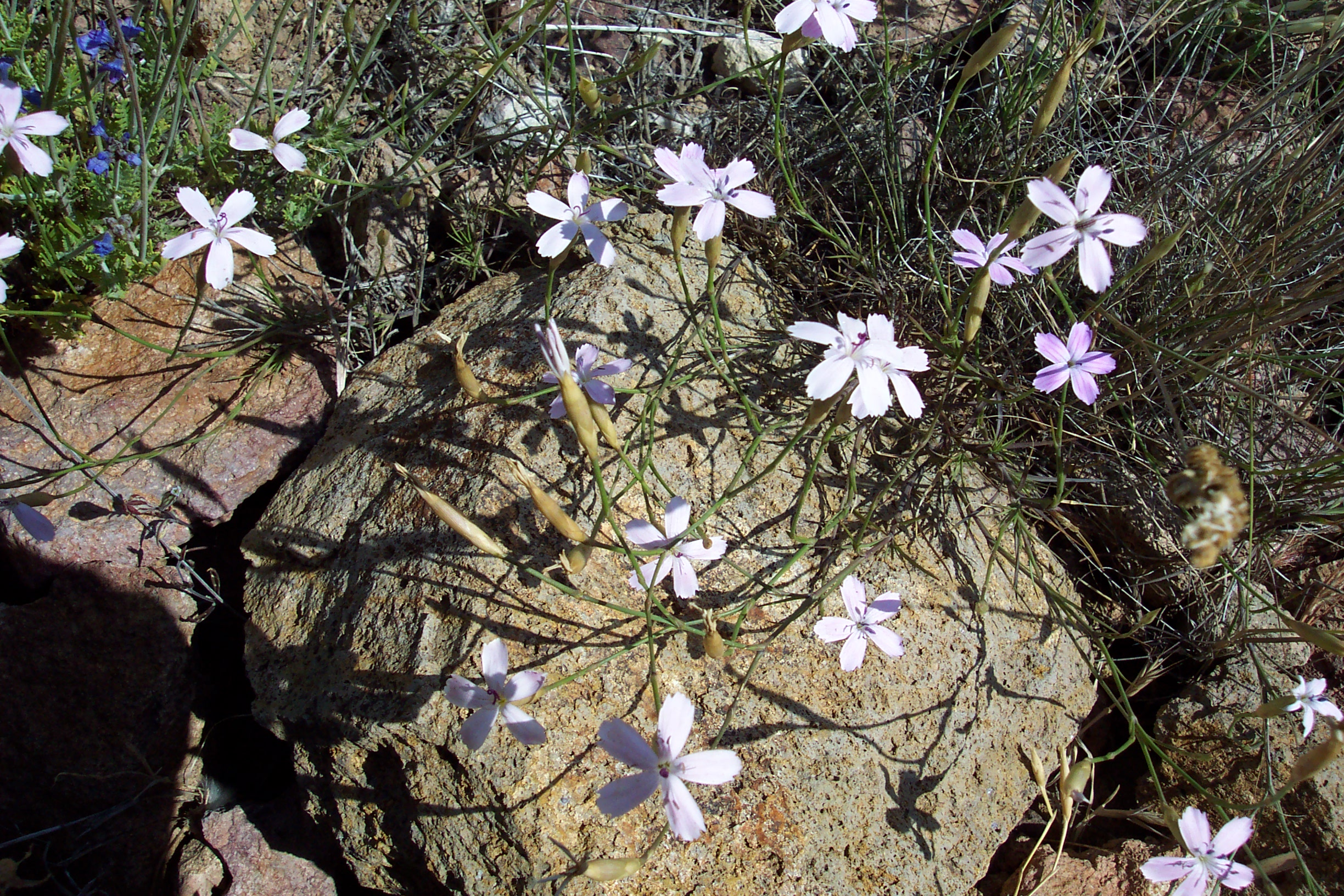 Clavellina del Cabo de Gta, endemismo del sudeste de España.